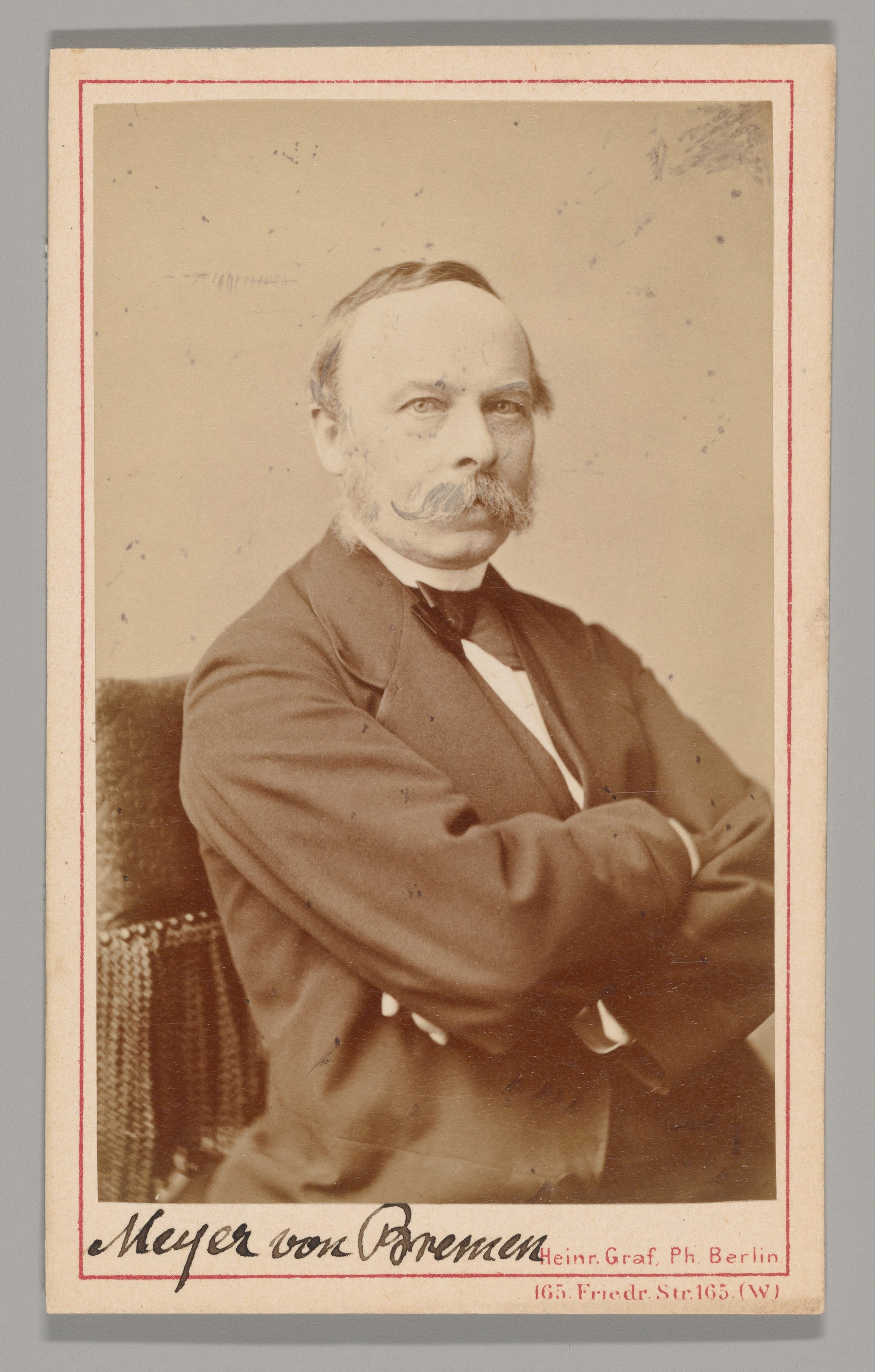 Carte-de-visite; Photographs